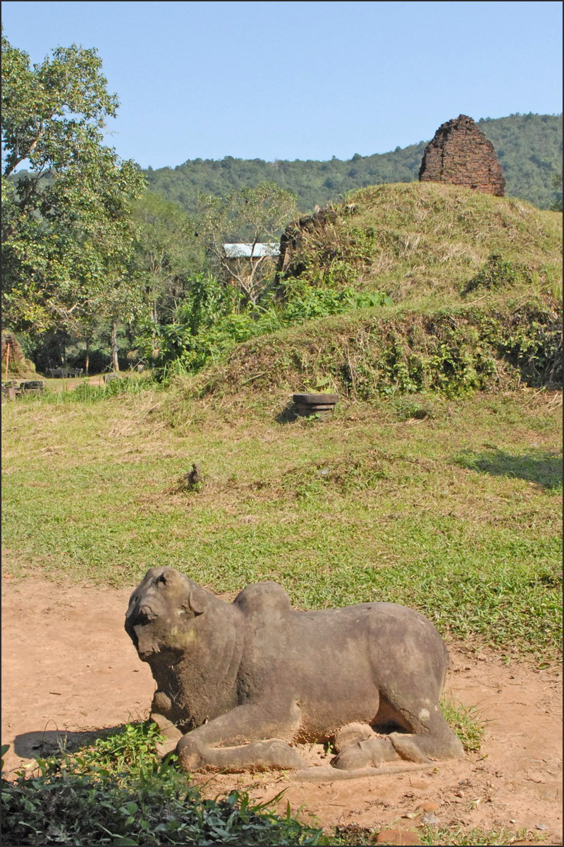 Les Temples Cham de My Son